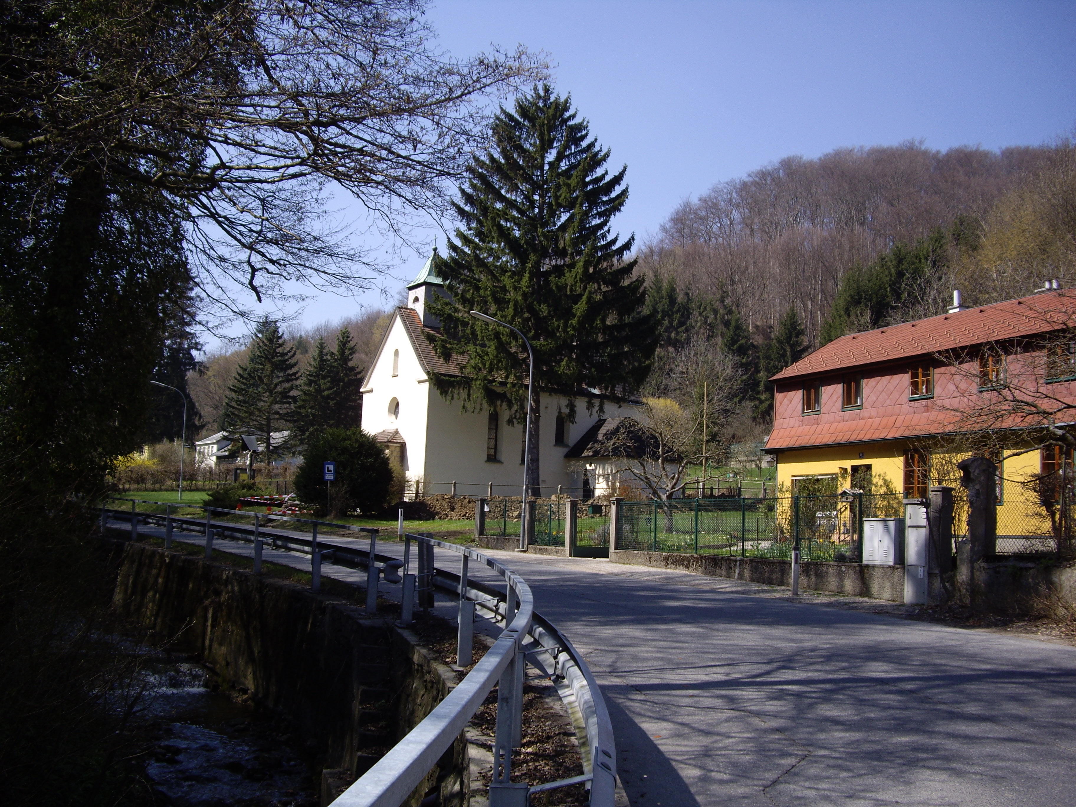 Kapelo "Maria Nomo" en Weidlingbach estas filio de la parohha preghejo Weidling.